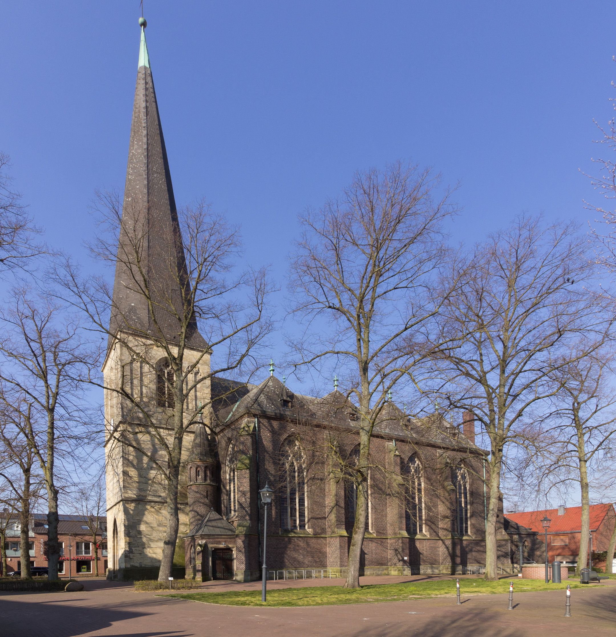 Senden, Monument 01-01, St. Urbanus, Ottmarsbocholt